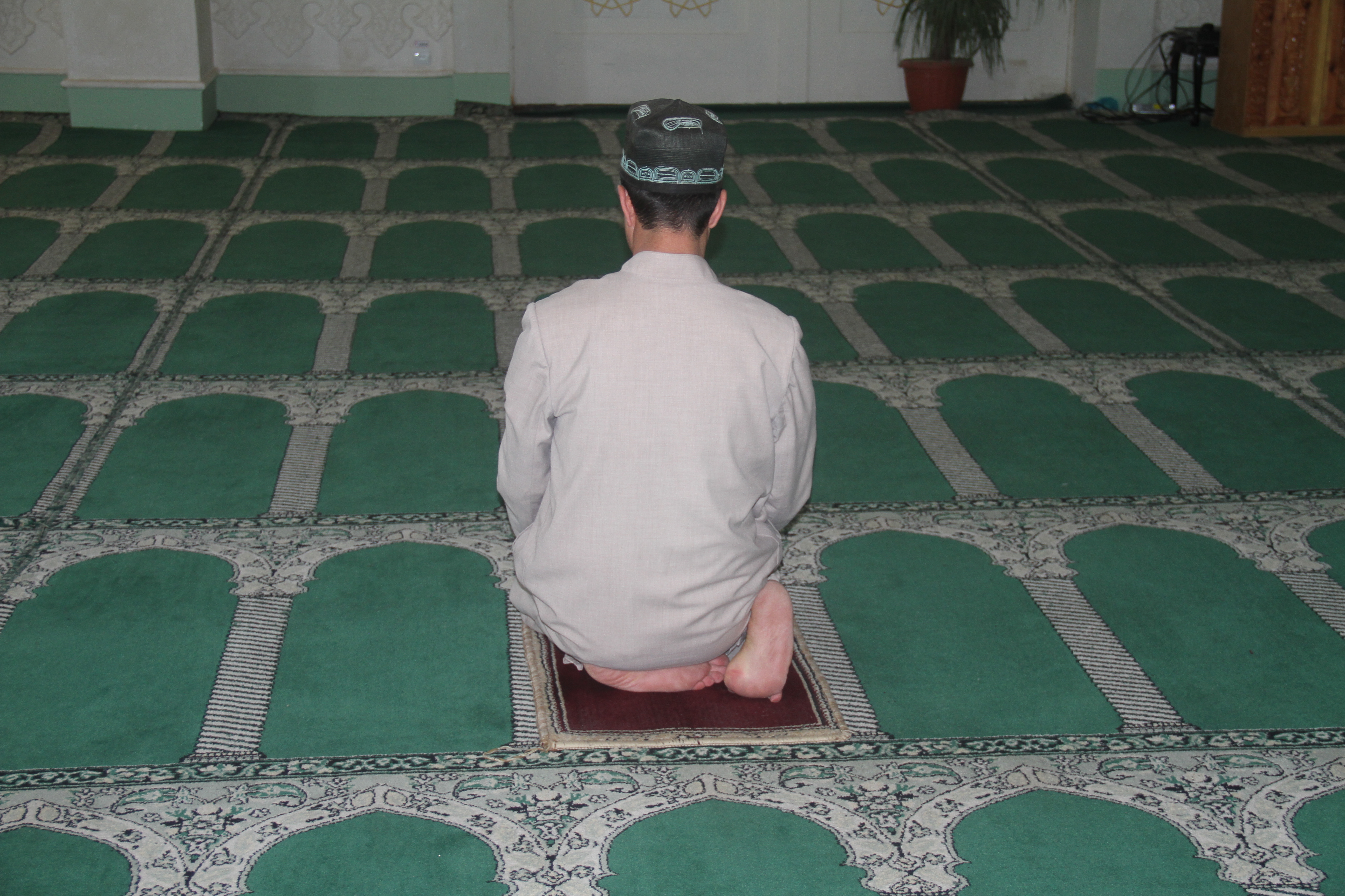 Тоҷикӣ: Тарзи нишастан дар намоз.